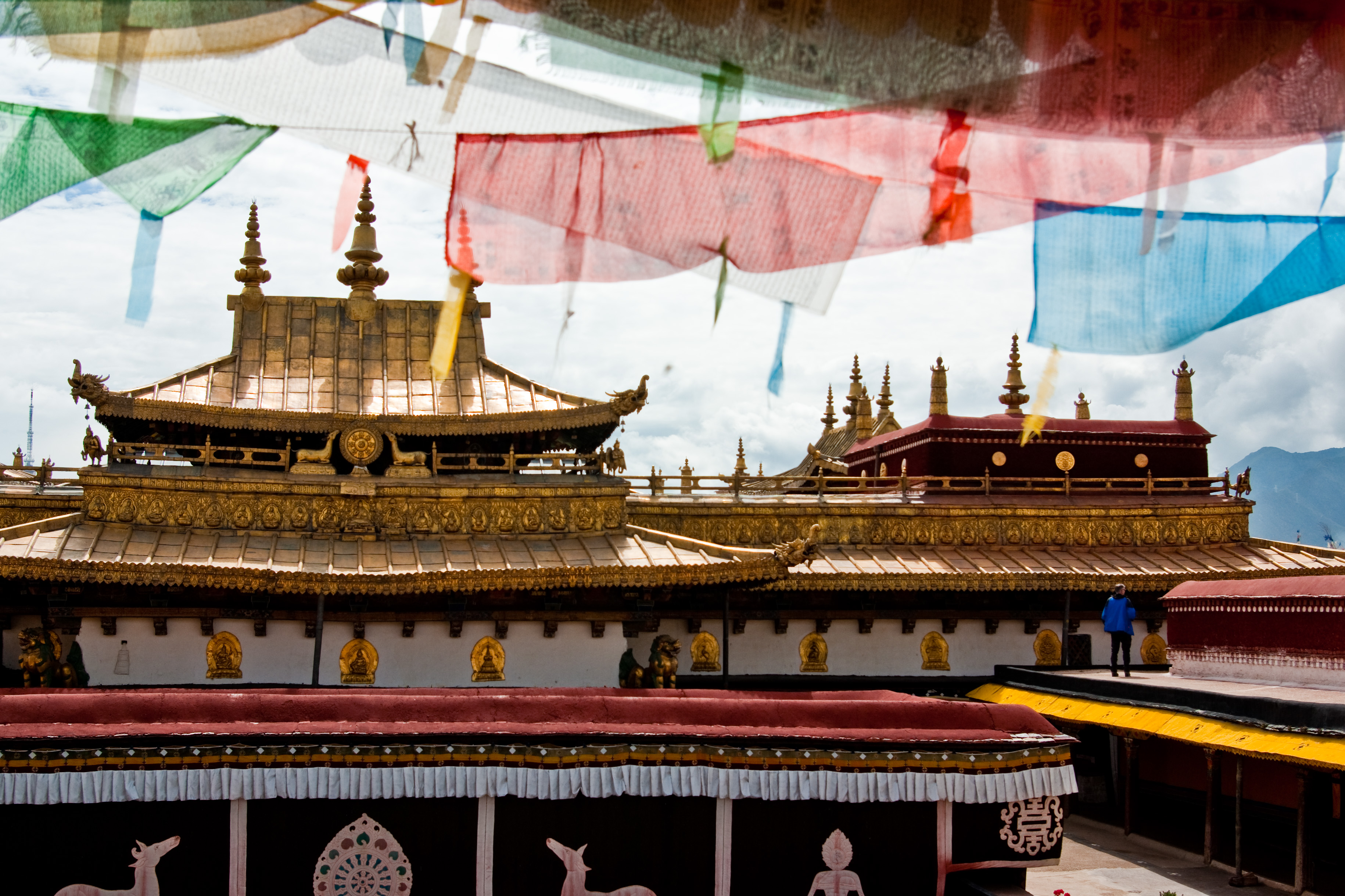 Jokhang